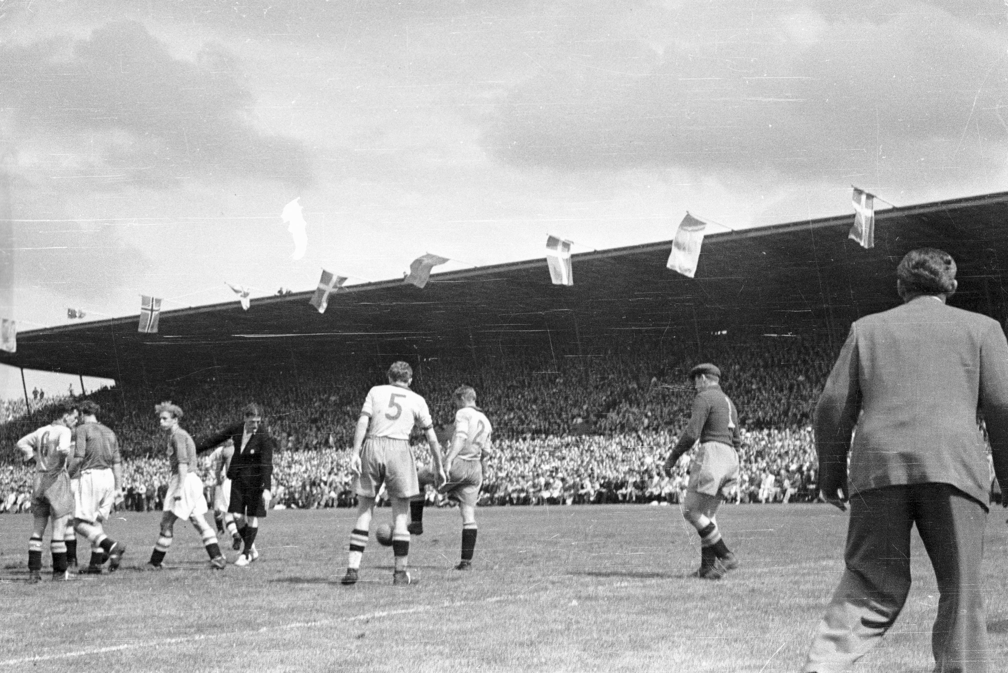 Situation fra kampen Danmark-Sverige, der var den første fodboldkamp mod Sverige efter befrielsen. Danmark tabte kampen 4-3. Fotograf: Frode Aggersbo Sted: Københavns Idrætspark, 1. Juli 1945 Se flere billeder her: More about the match: Download and rights: More about The Museum of Danish Resistance (Frihedsmuseet)